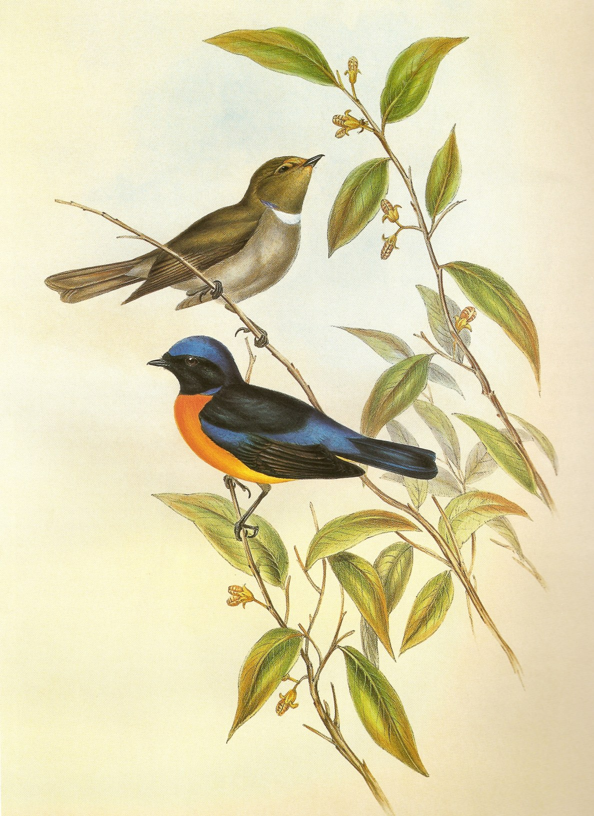 Rufous-bellied Niltava (Beautiful Niltava) Niltava sundara (Hodgson)